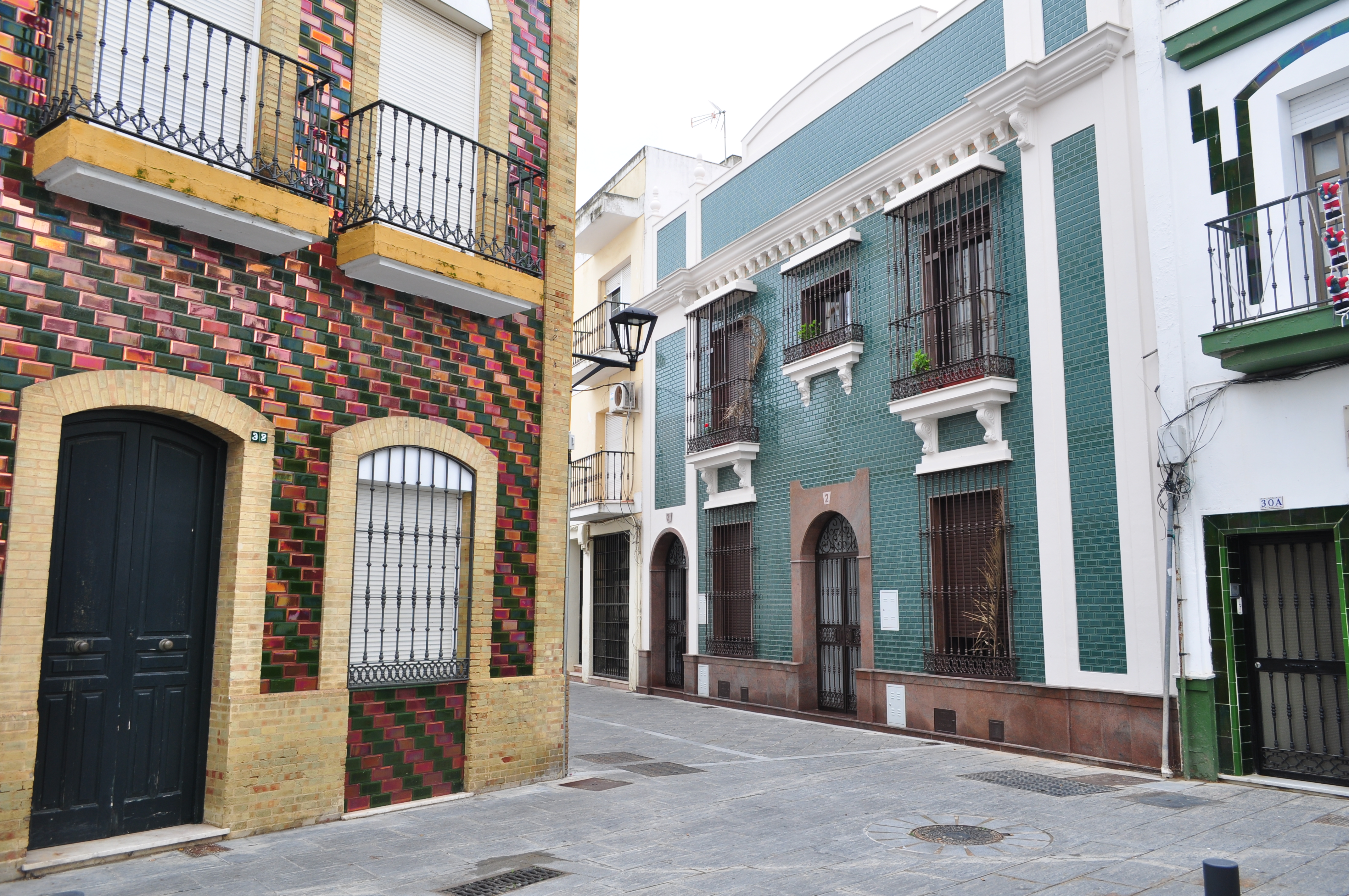 Confluencia de las calles Desengaño, Armada Española y del Prado. Isla Cristina, Costa de la Luz.